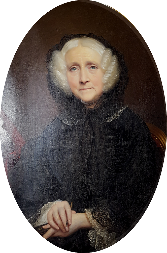 Marie Cécile Rondel d'Heudreville, épouse de Louis Rioult, marquis de Neuville